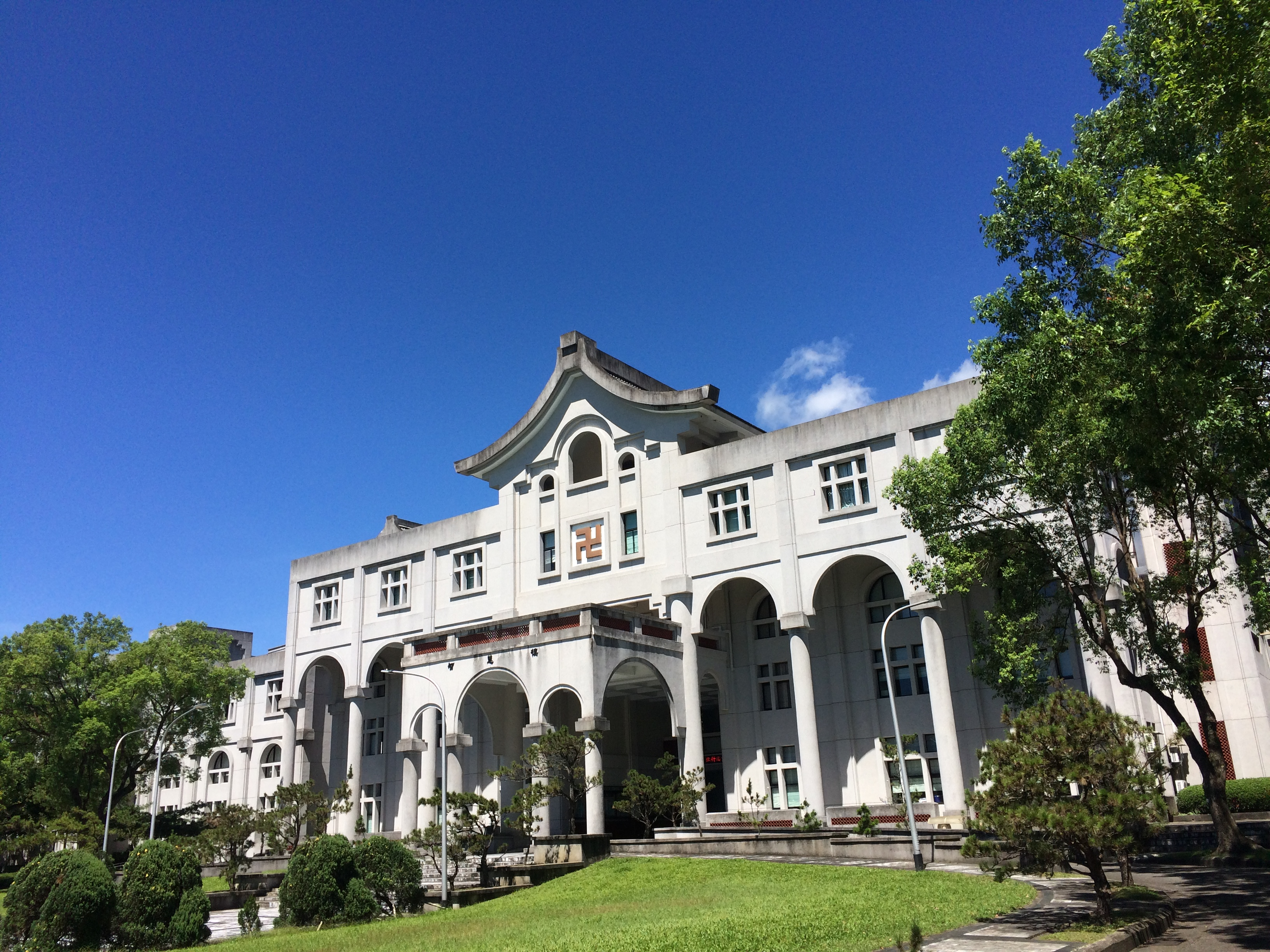 慈濟科技大學智慧樓